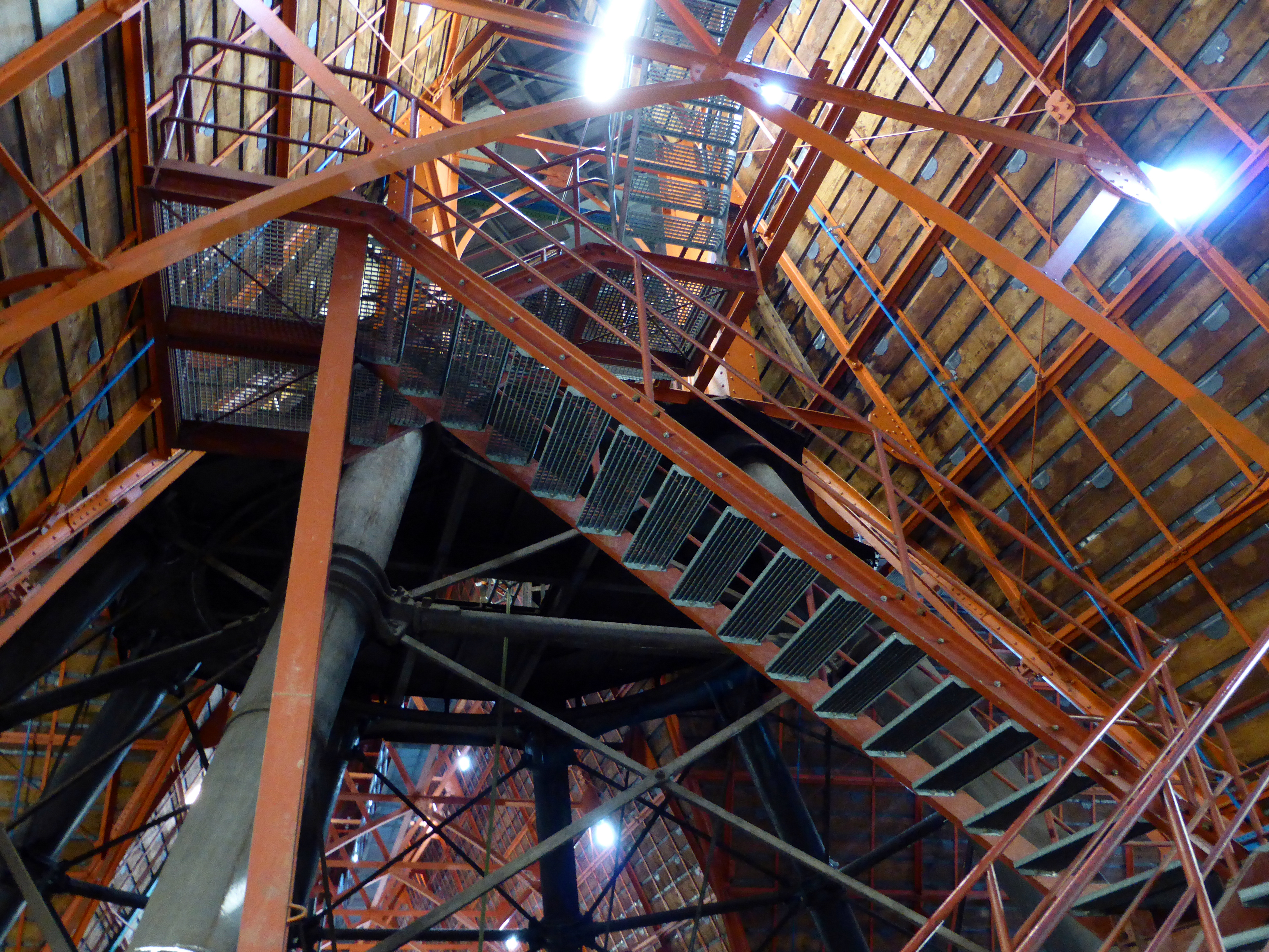 Kölner Dom - Dachstuhl. Vierungsturm, Blick von unten auf die eiserne Grundplatte des ersten Geschosses. Darunter gusseiserne Säulen des Unterbaus, oben aufgesetzt orange lackierte Ecksäulen mit quadratischem Profil.